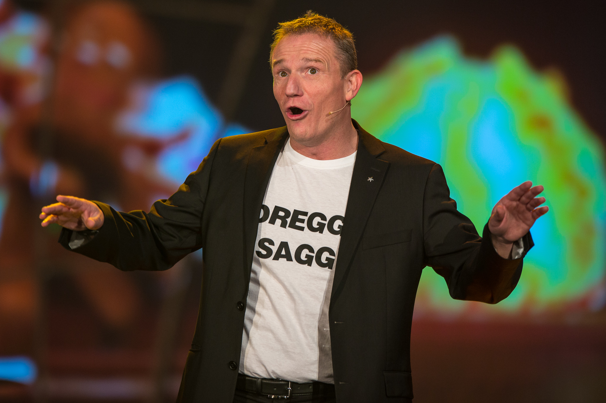 BR,Bayerisches Fernsehen,Frankenhalle,Live-Sendung,Michl Müller,Sternstunden-Gala,Sternstundengala